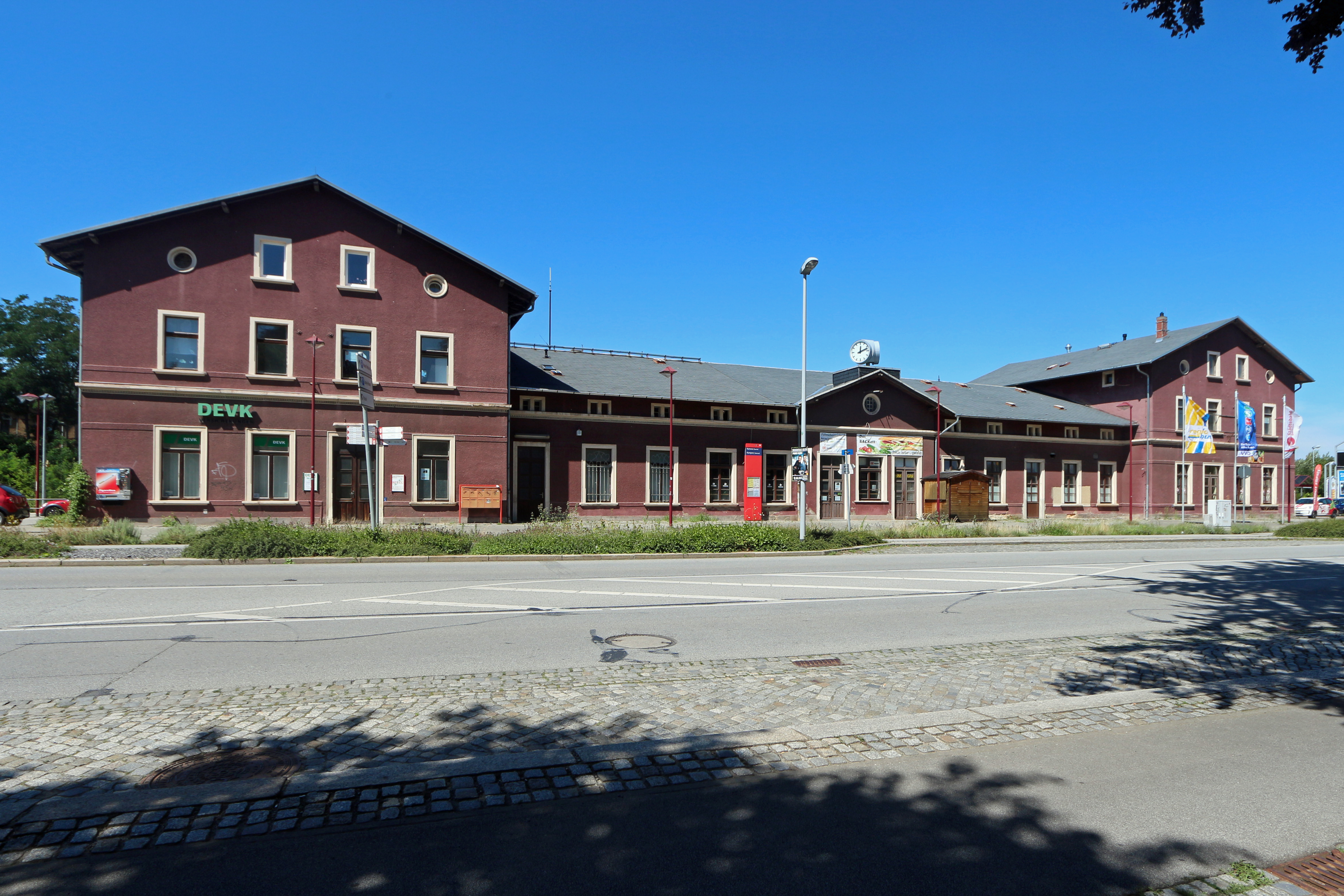 Kamenz, Bahnhof